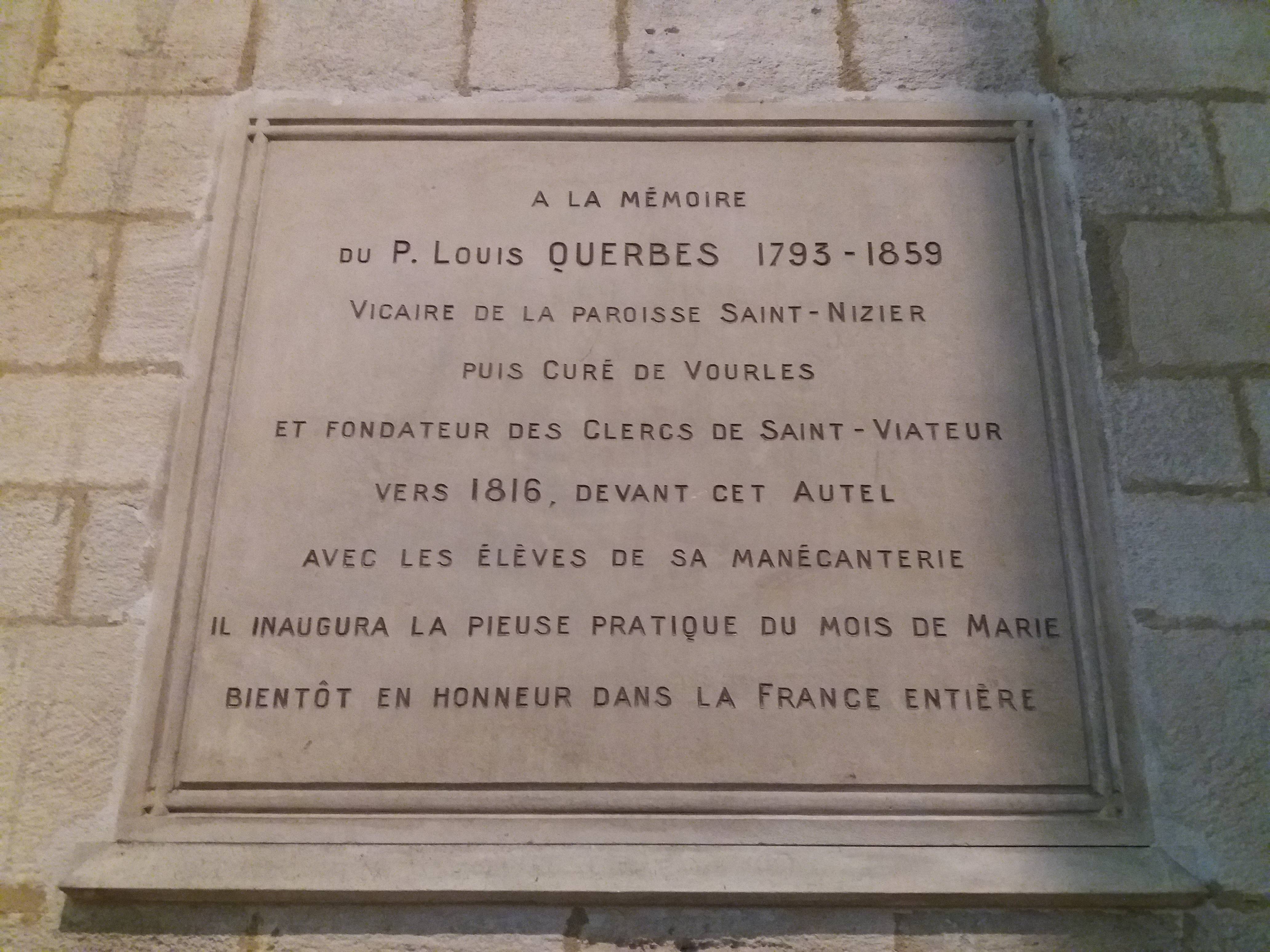 Plaque du Père Louis Querbes.